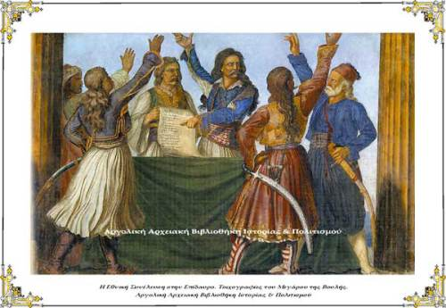 Ludwig Michael von Schwanthaler. Η Εθνική Συνέλευση στην Επίδαυρο.